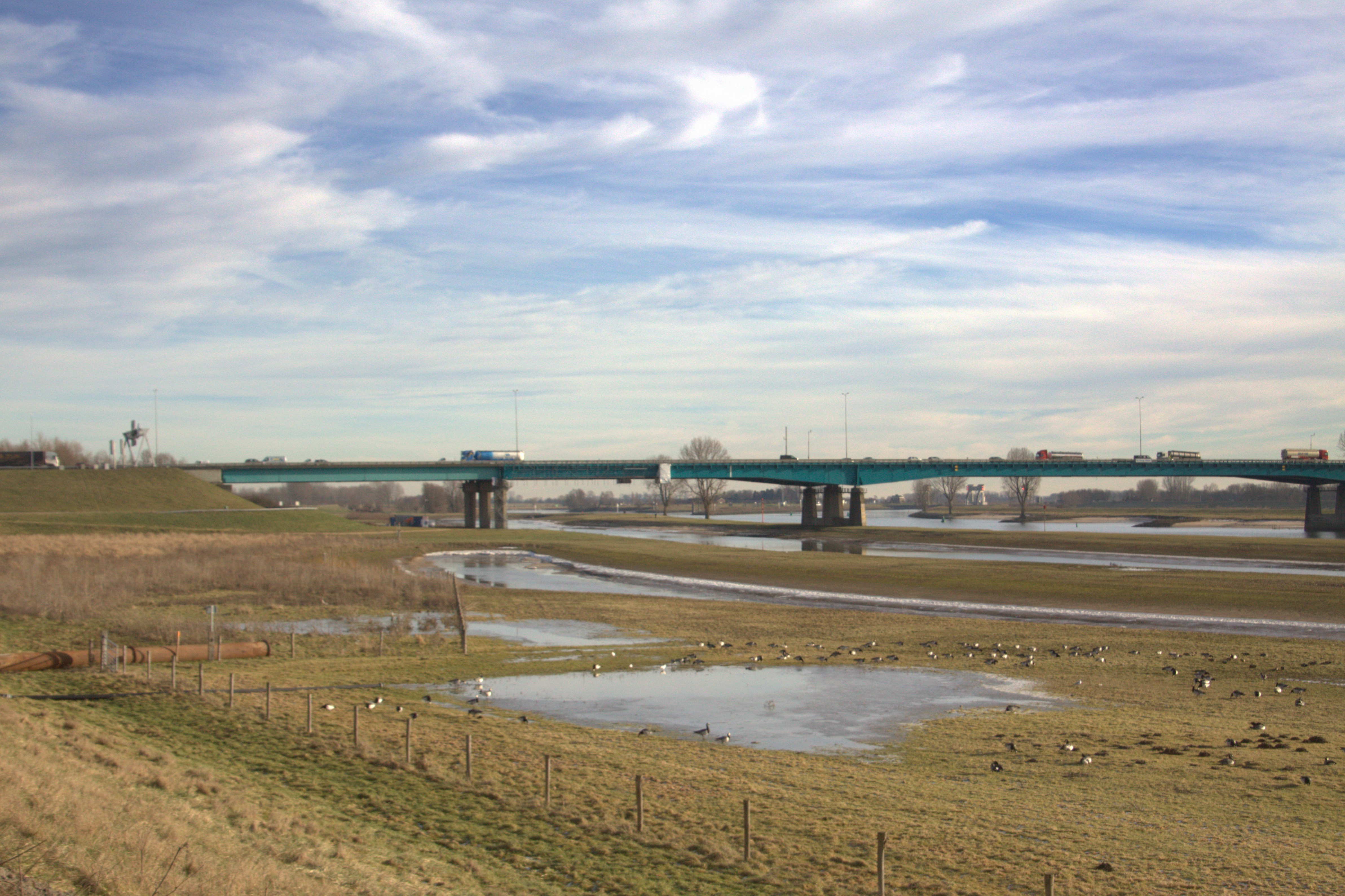 De Hagesteinsebrug over de rivier de Lek in de A27 met daaronder de nevengeulen in de uiterwaard in het kader: Ruimte voorde rivier de Lek.